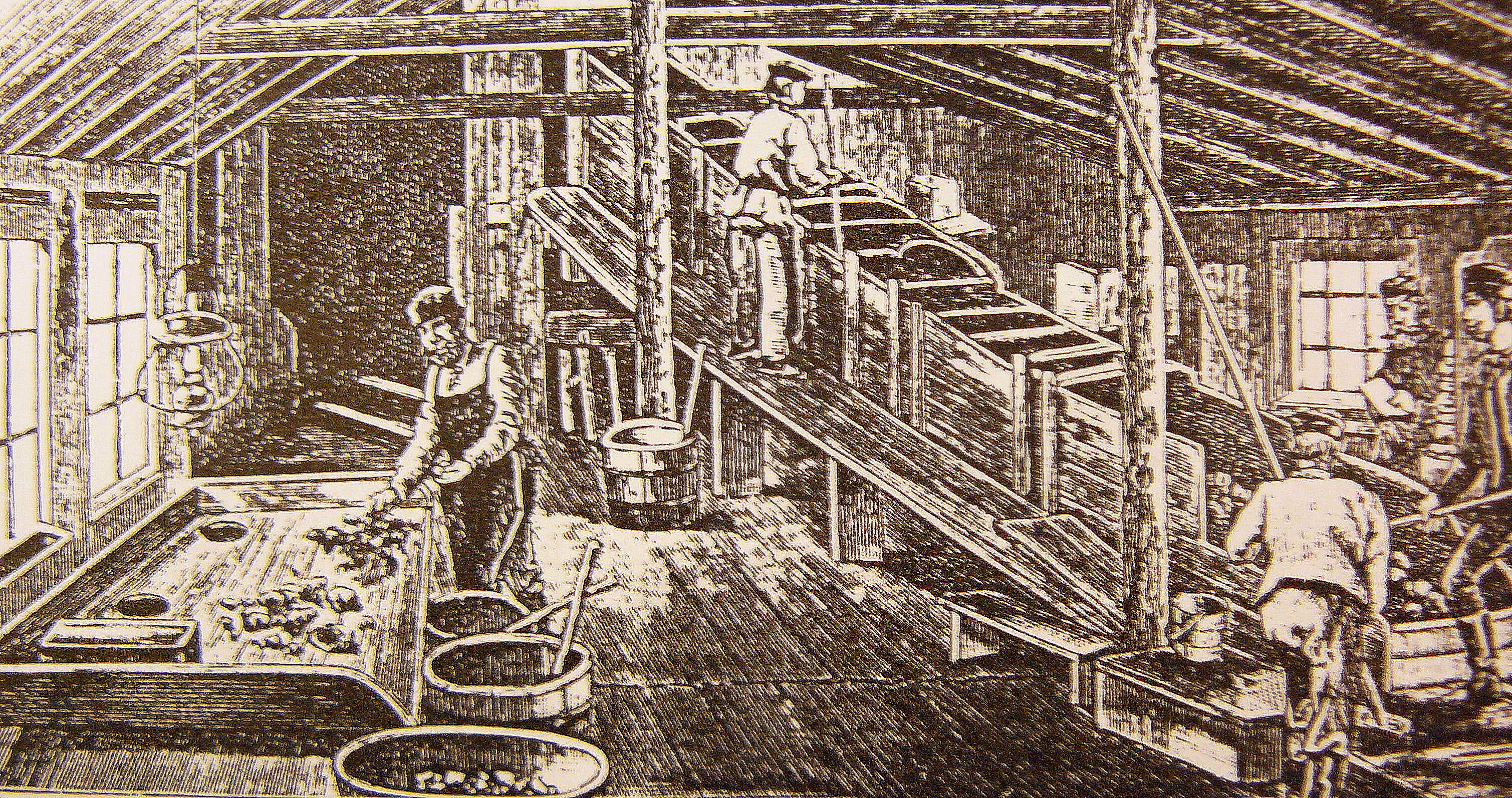 Bernsteinwäscherei